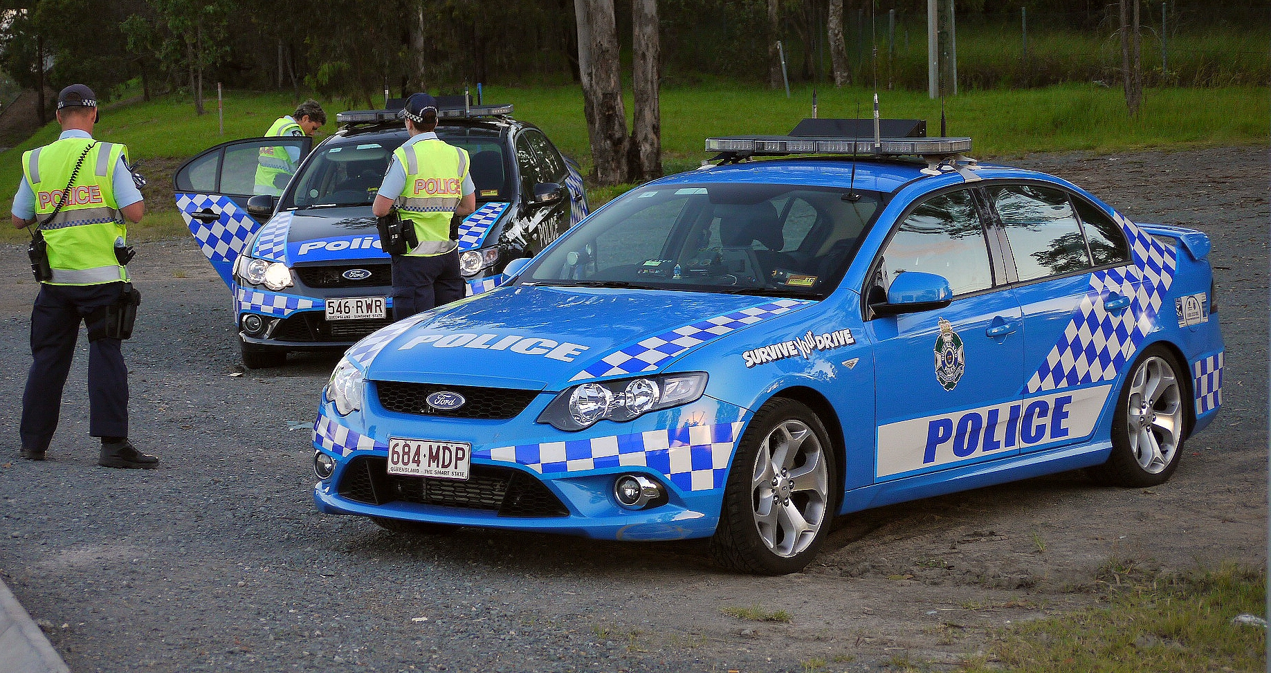 Radar Ops on Logan Rd Goodna